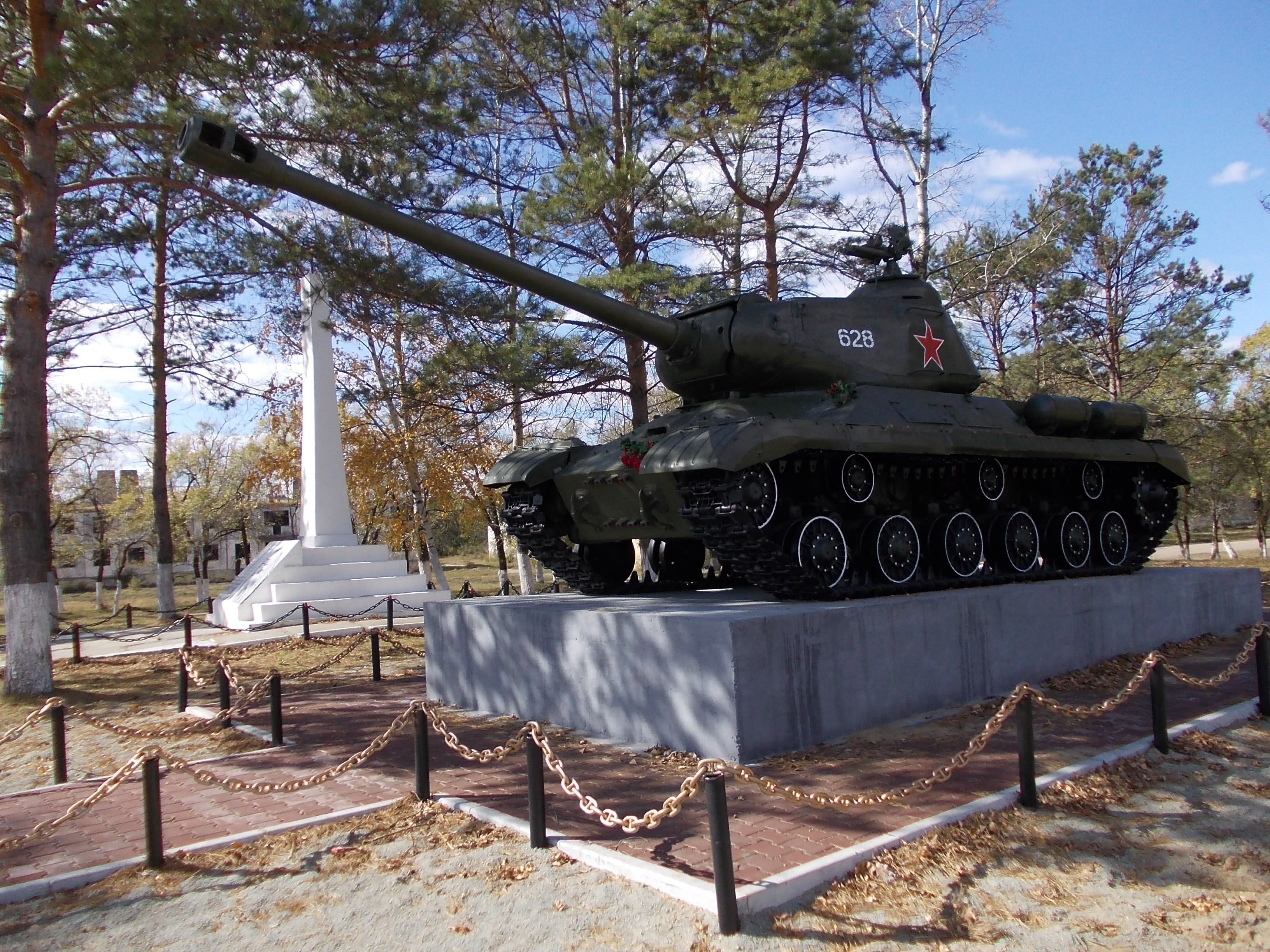 Памятник поставлен в честь очередной годовщины окончания русско-японской войны.